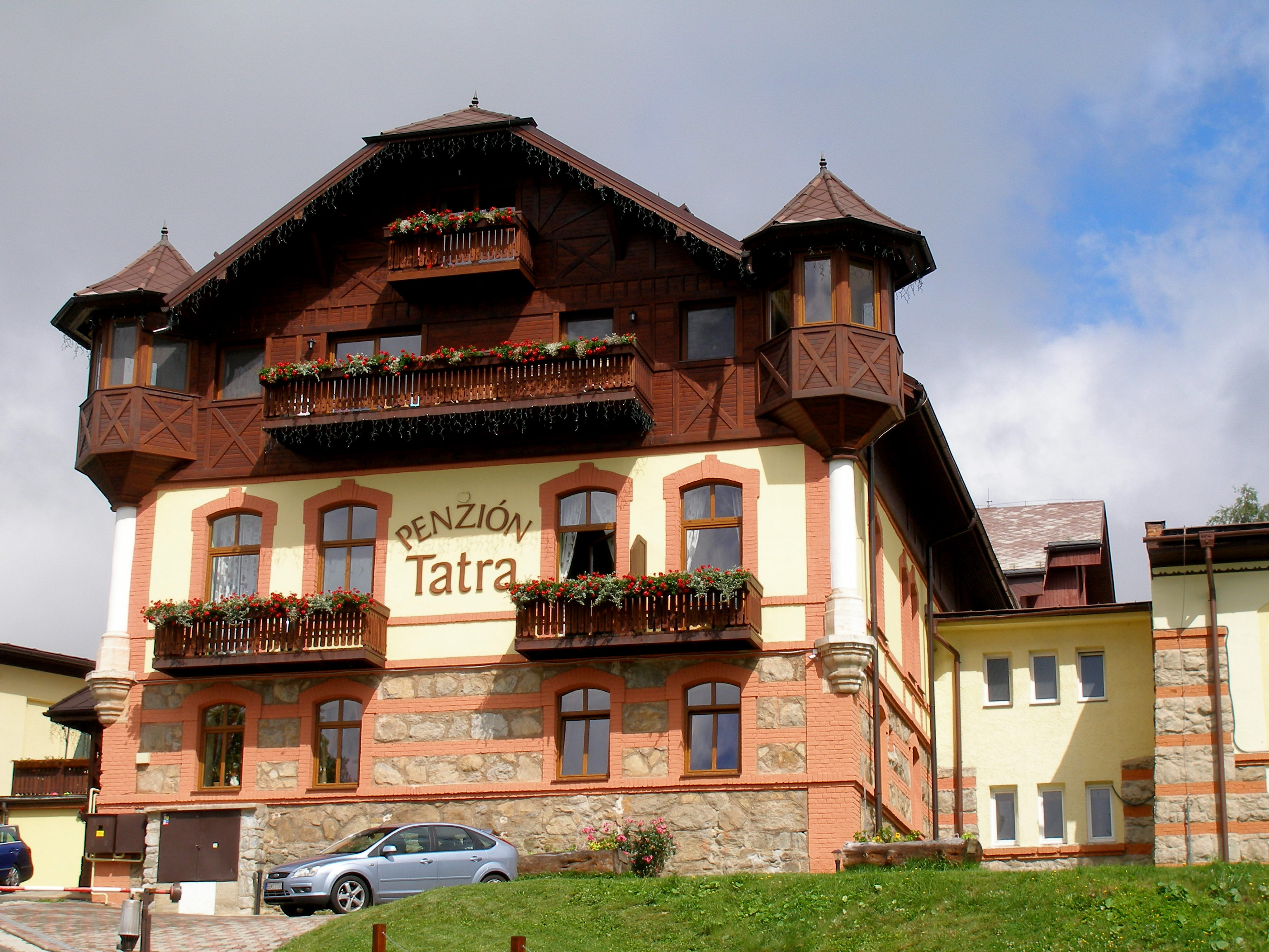 Tatranská osada Starý Smokovec, mesto Vysoké Tatry, okres Poprad.